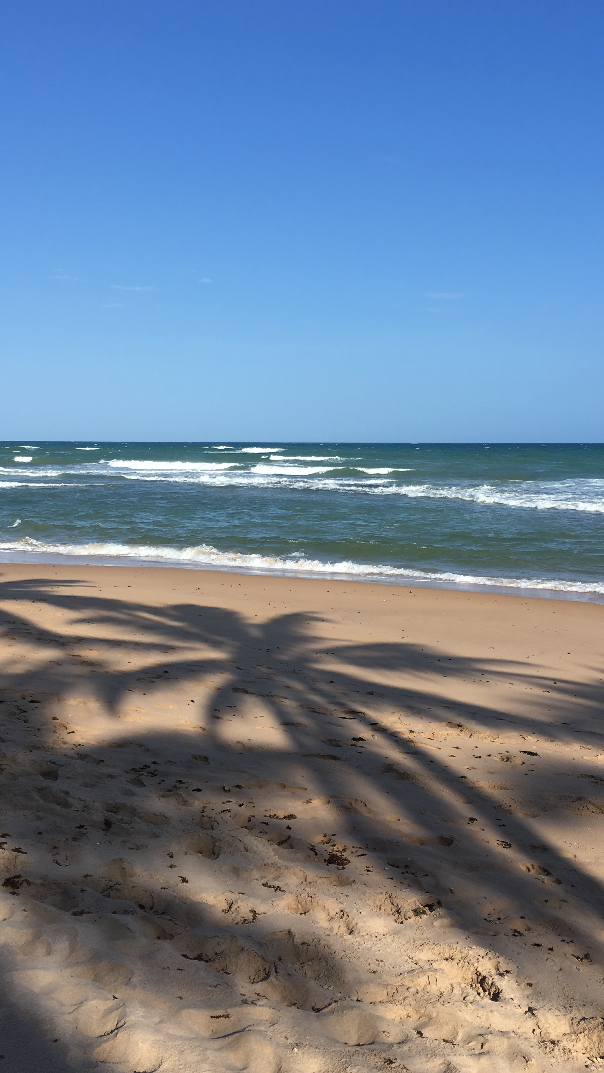 Praia de Jauá e suas ondas características